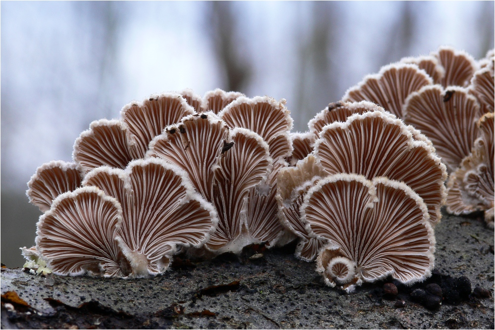 Spaltblättlinge (Schizophyllum)